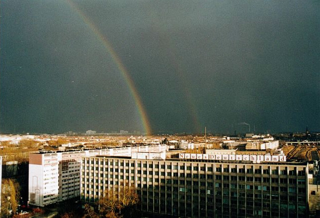 Redaktionsgebäude des Neuen Deutschland am Franz-Mehring-Platz im Berliner Bezirk Friedrichshain. Die Buchstaben mit der Werbung für die Zeitung standen auch in der Zeit auf dem Haus, als die Redaktion in einem angemieteten Gebäude am Berliner Osthafen ihren Sitz hatte. Seit 2005 arbeitet die Redaktion wieder hier.